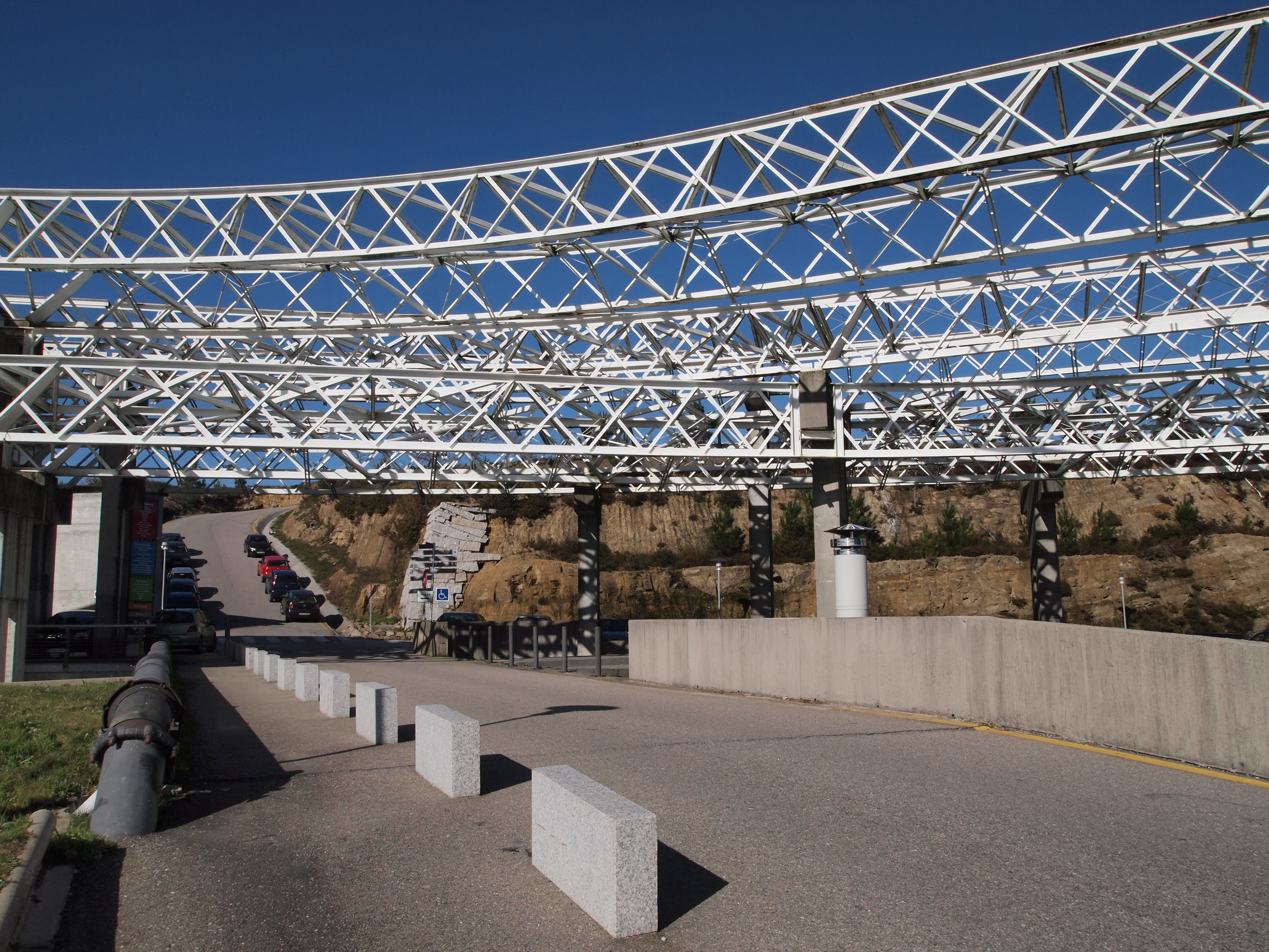 Campus Lagoas Marcosende, Zamáns, Vigo